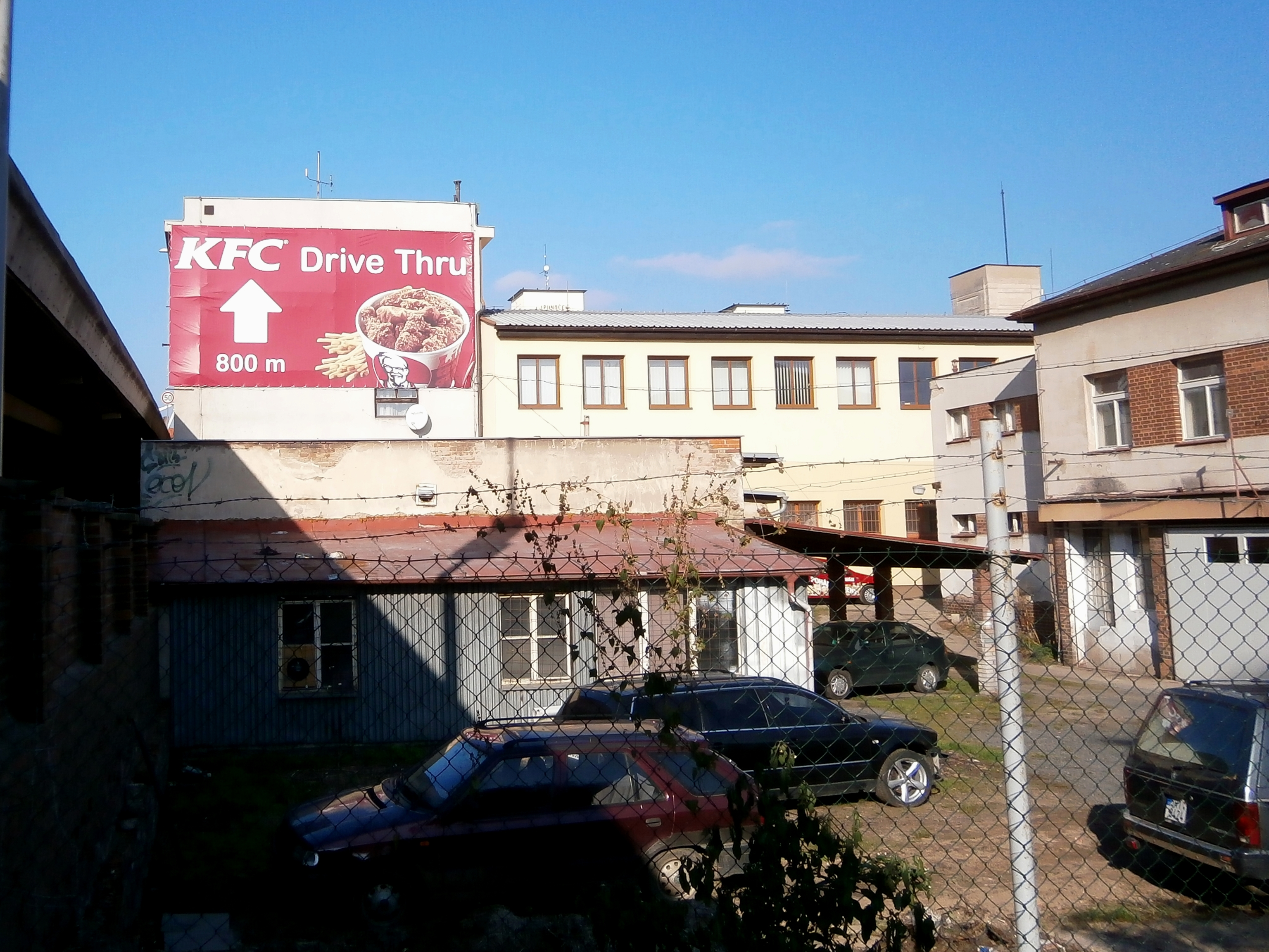 Pilnáčkova továrna (Hradec Králové)